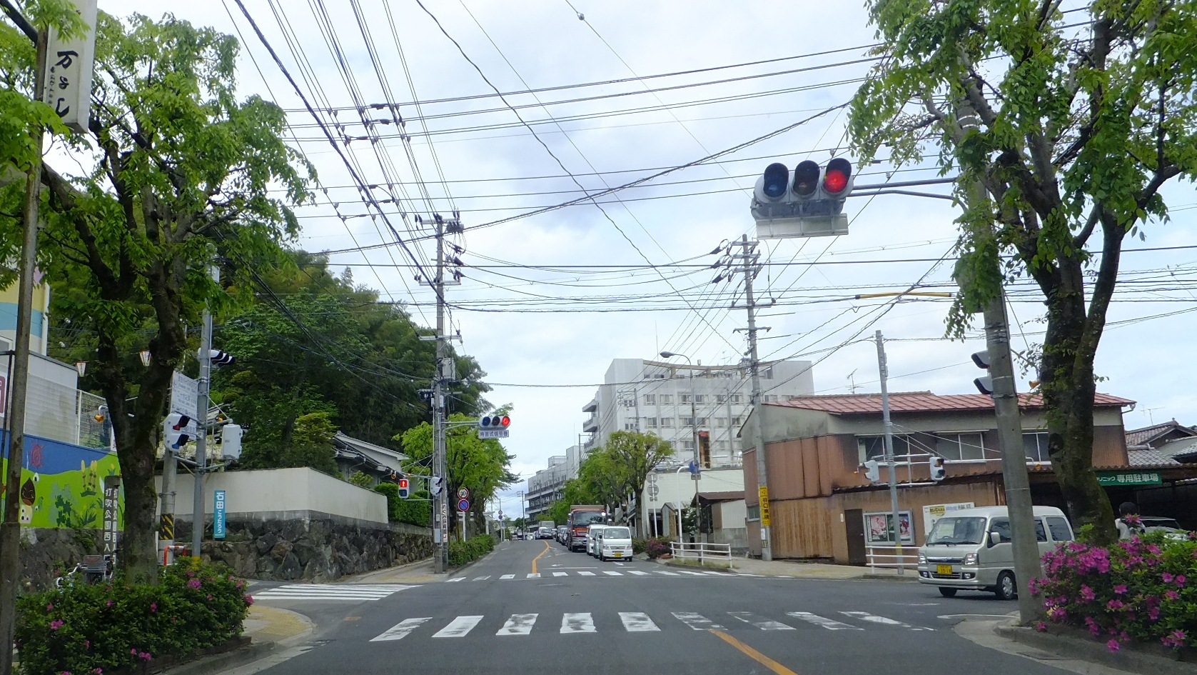 鳥取県倉吉市仲ノ町 鳥取県道38号倉吉福本線